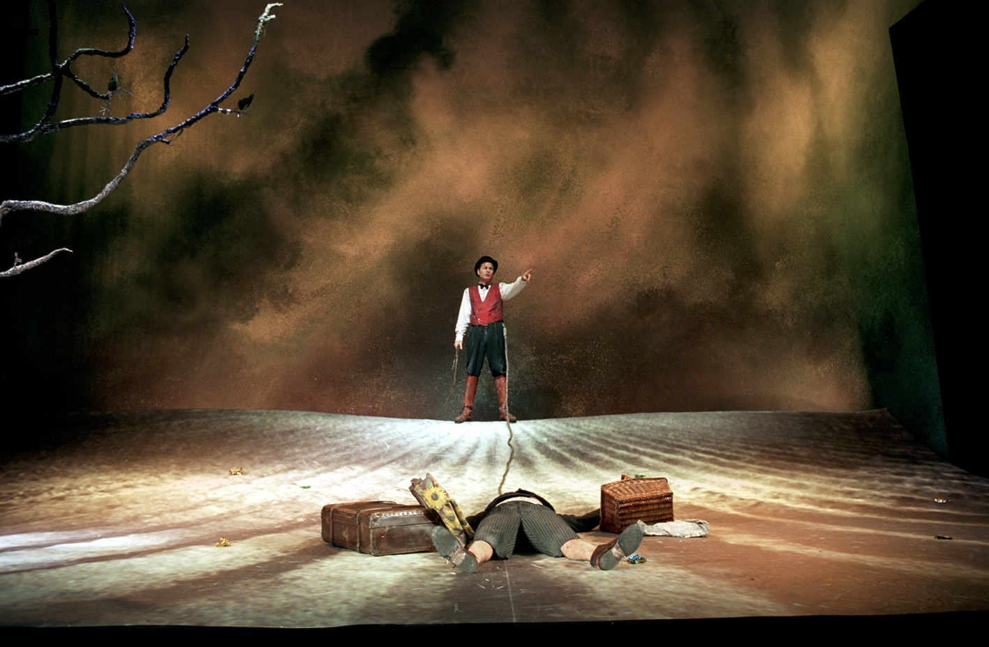 מחכים לגודו 2002